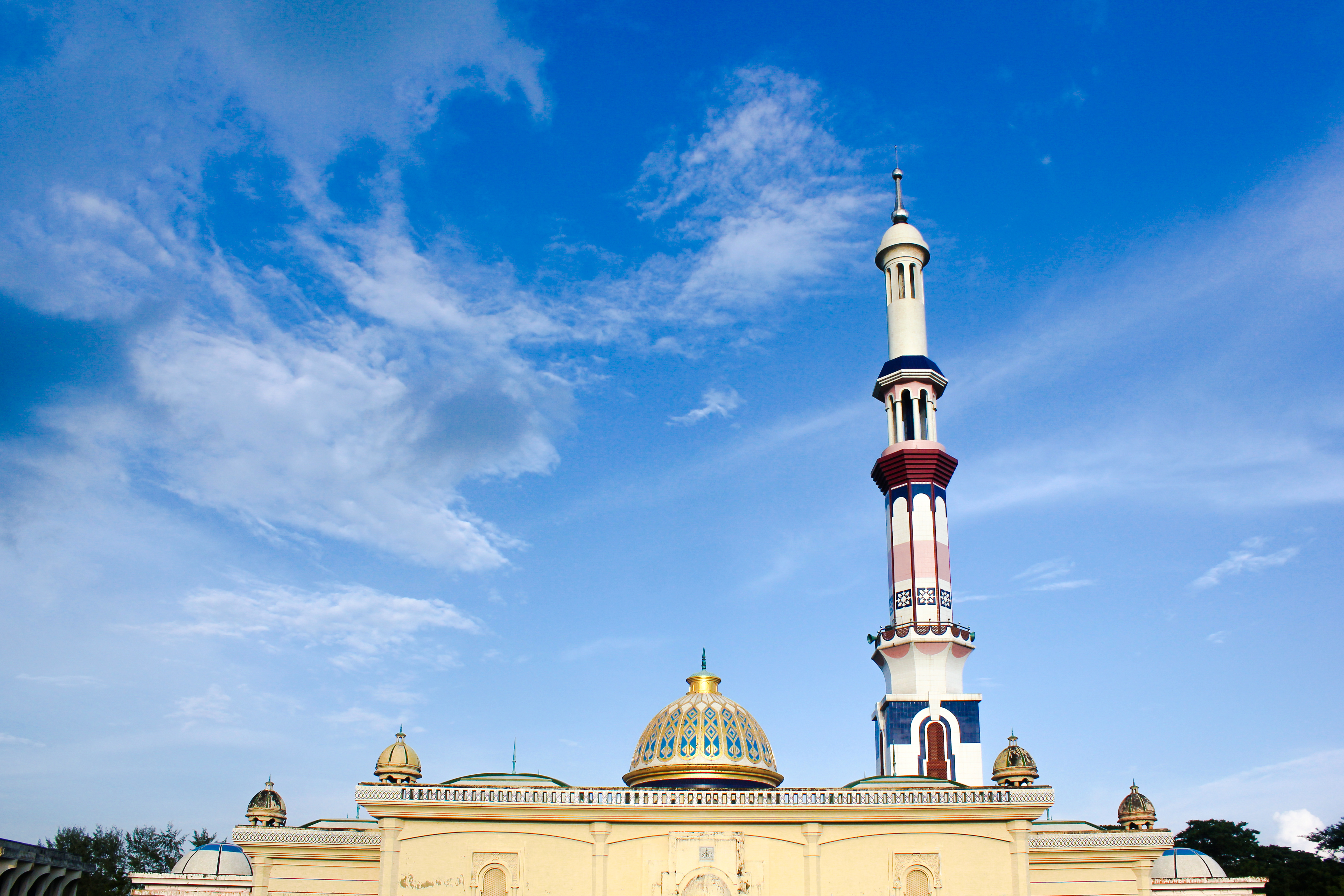 বাইতুল আমান জামে মসজিদ